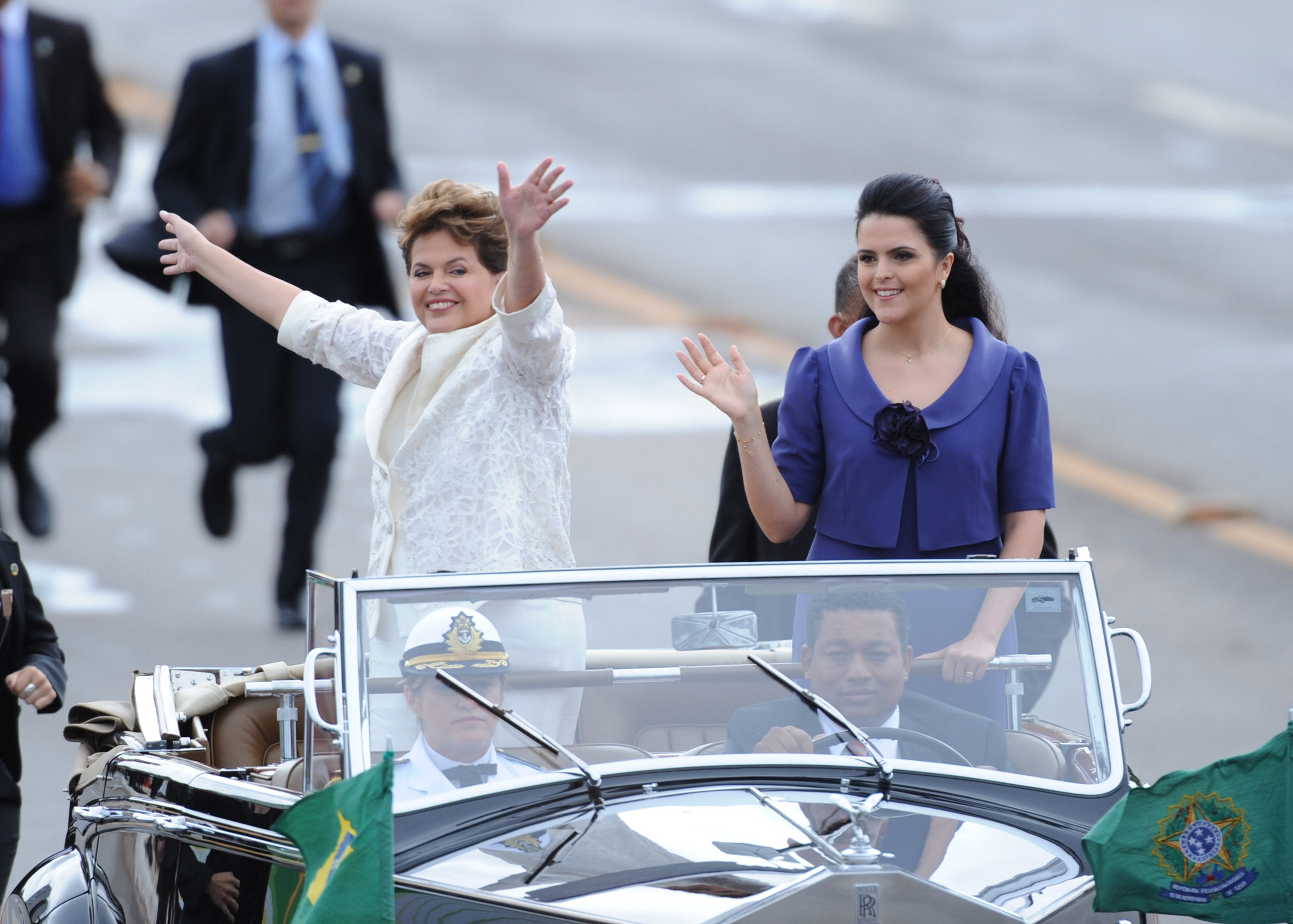 A presidenta Dilma Rousseff desfila no Rolls Royce presidencial ao lado de sua filha Paula Rousseff, em direção ao Palácio do Planalto. Brasília, 1º de janeiro de 2011.